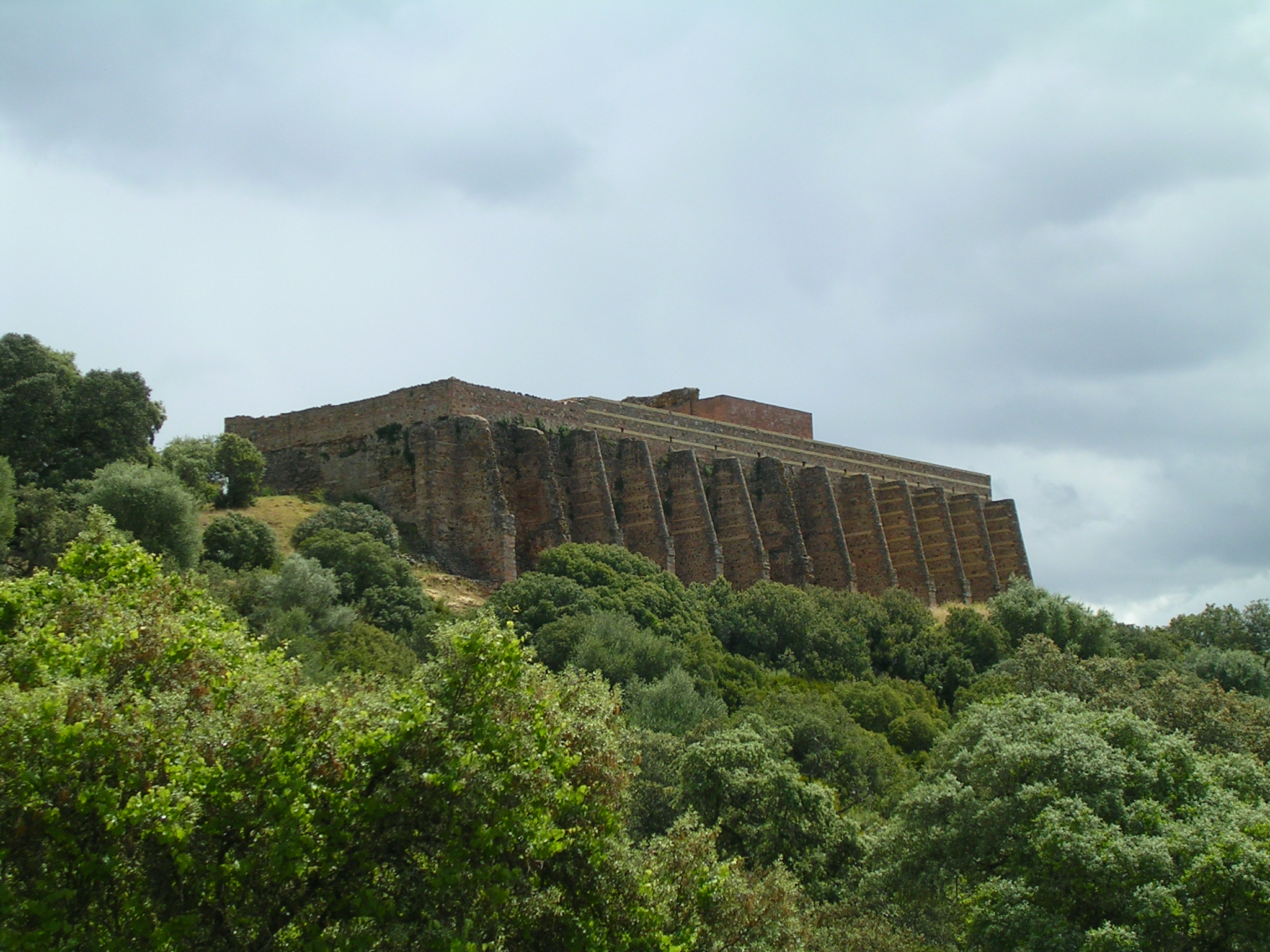 Ruinas romanas de Munigua.